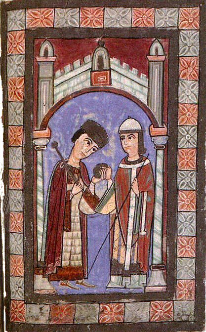 Papst Paschalis II. [oder Bischof Ruthard von Mainz?] überreicht Kaiser Heinrich V. den Reichsapfel als Symbol der weltlichen Macht